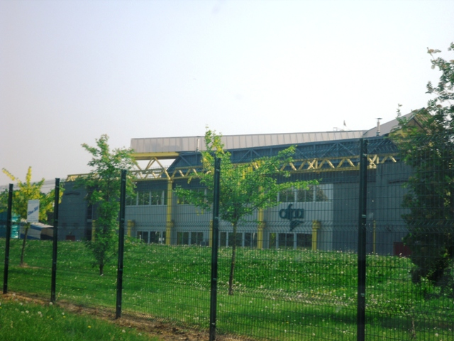 Le centre de formation pour adultes Afpa à Ris-Orangis (91)